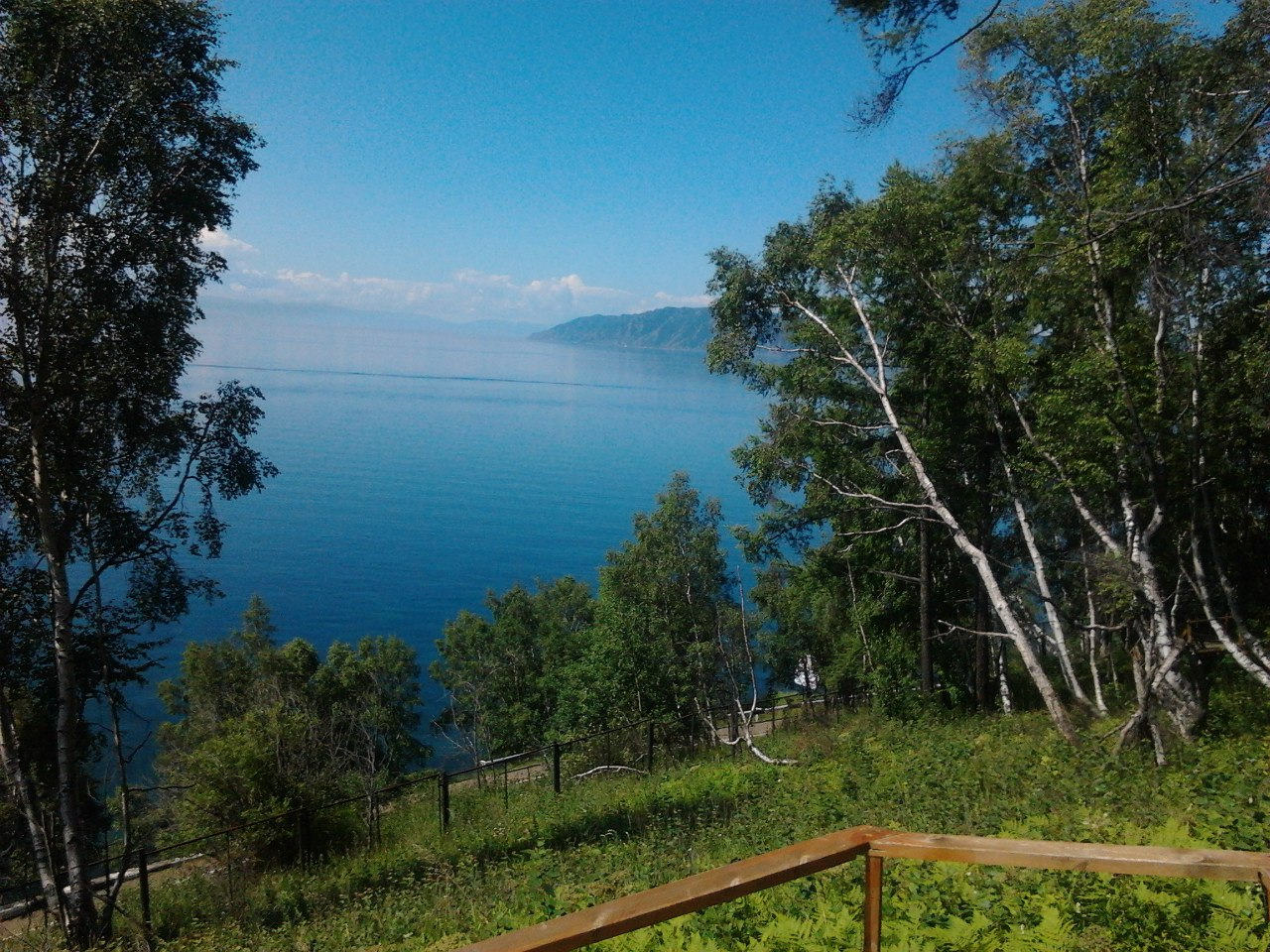 Листвянка, Иркутский район This image is related to the protected area of Russia number 3810100